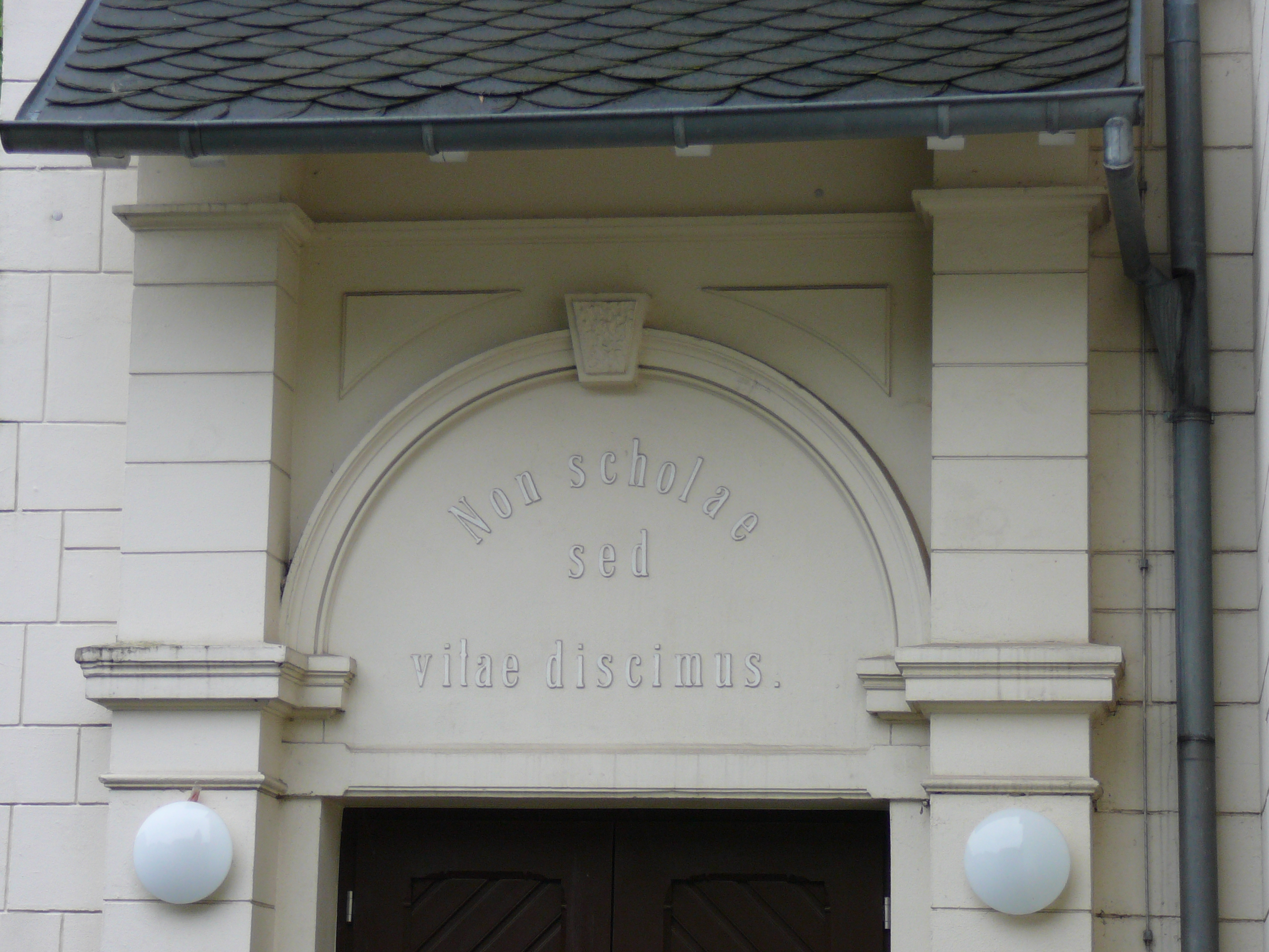 Scheidtstraße, Wuppertal